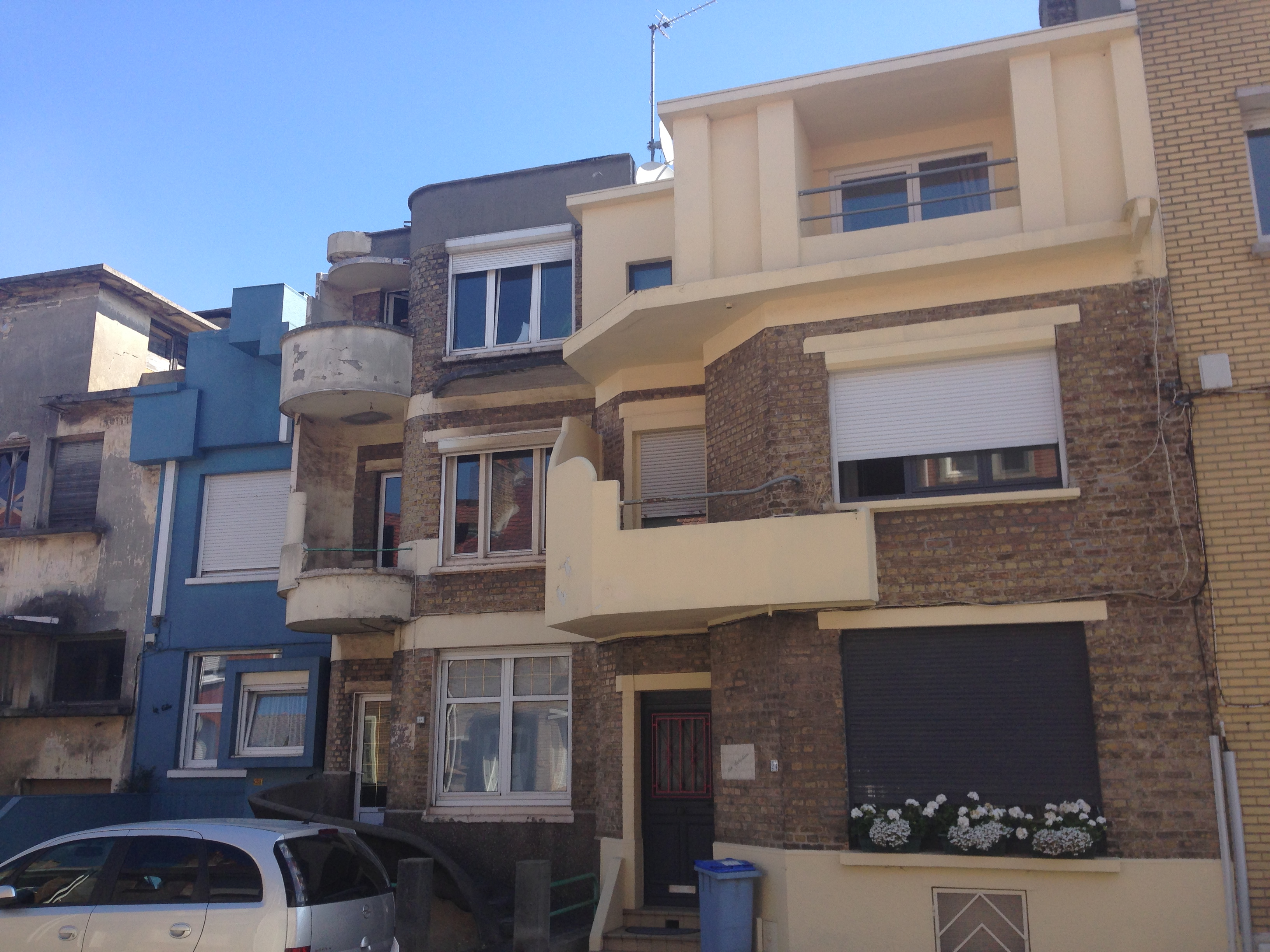 24-30 avenue Eugène Dumez Dunkerque Quartier Excentric architecte François Reynaert